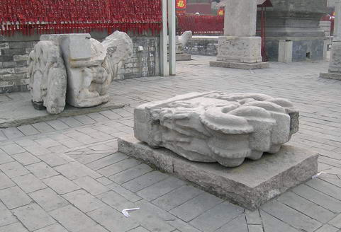 东岳庙的残碑 smartneddy 2005年2月13日摄于东岳庙